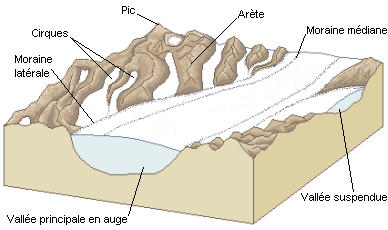 Schéma légendé d'un paysage glaciaire